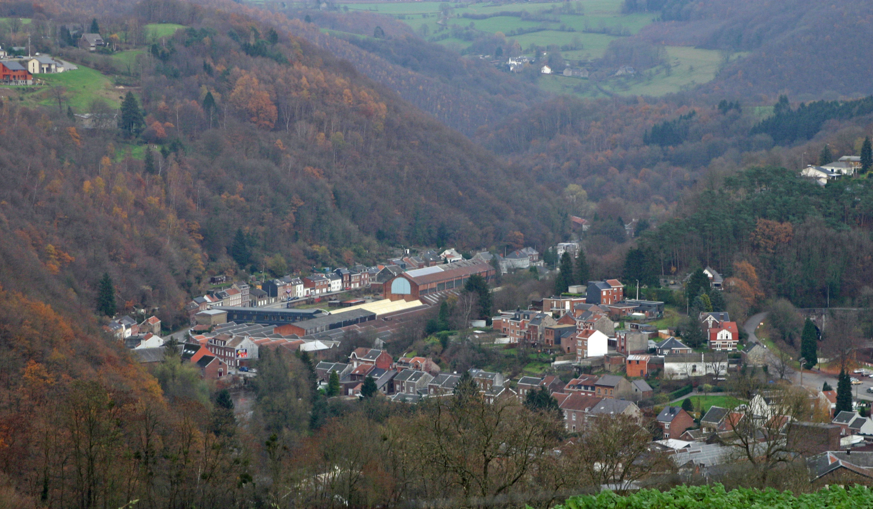 Vue op Nessonvaux vum Lieu-dit La Baleine